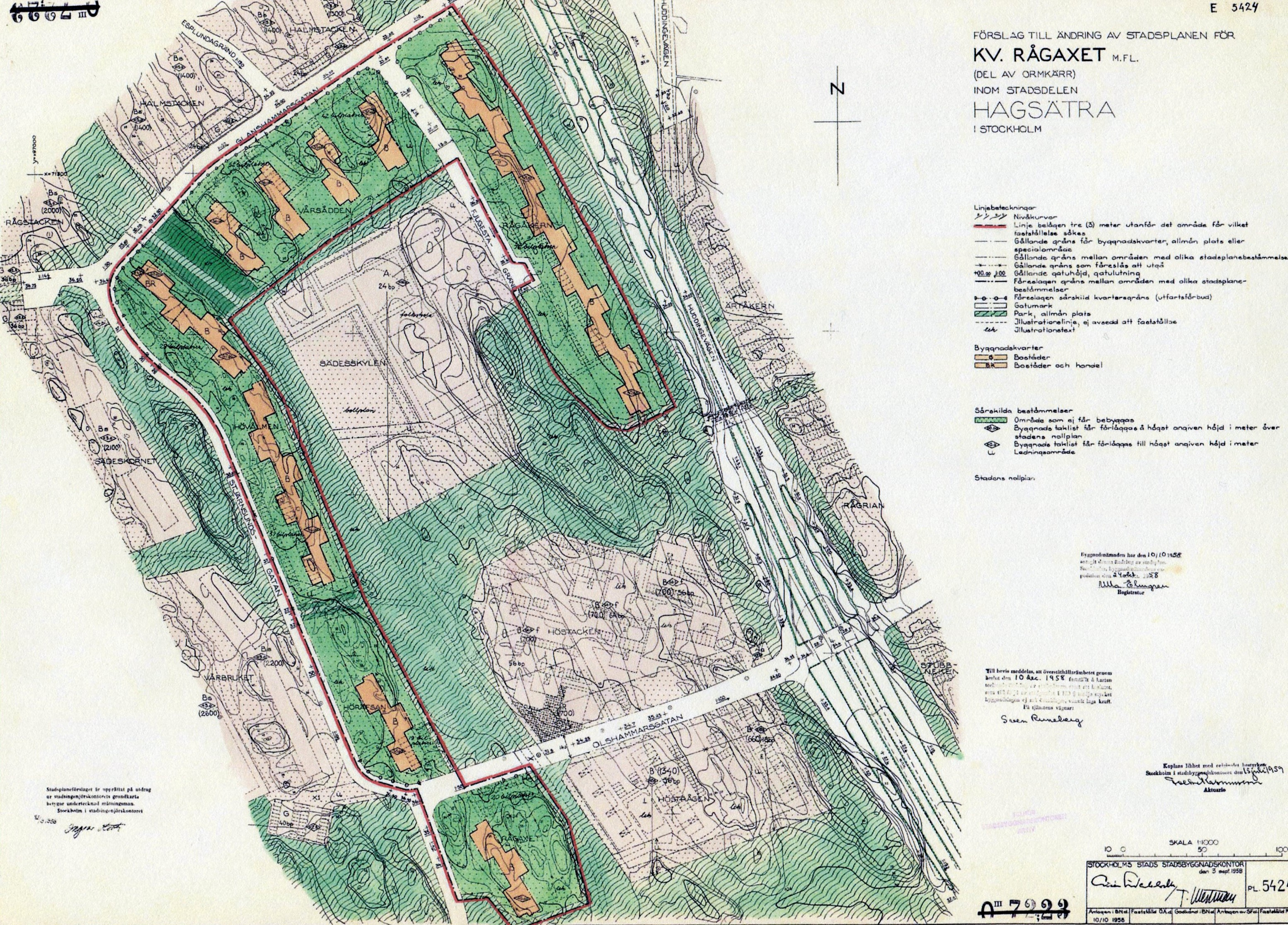 Stadsplan över kv Rågaxet m.fl. (Ormkärr) i Hagsätra